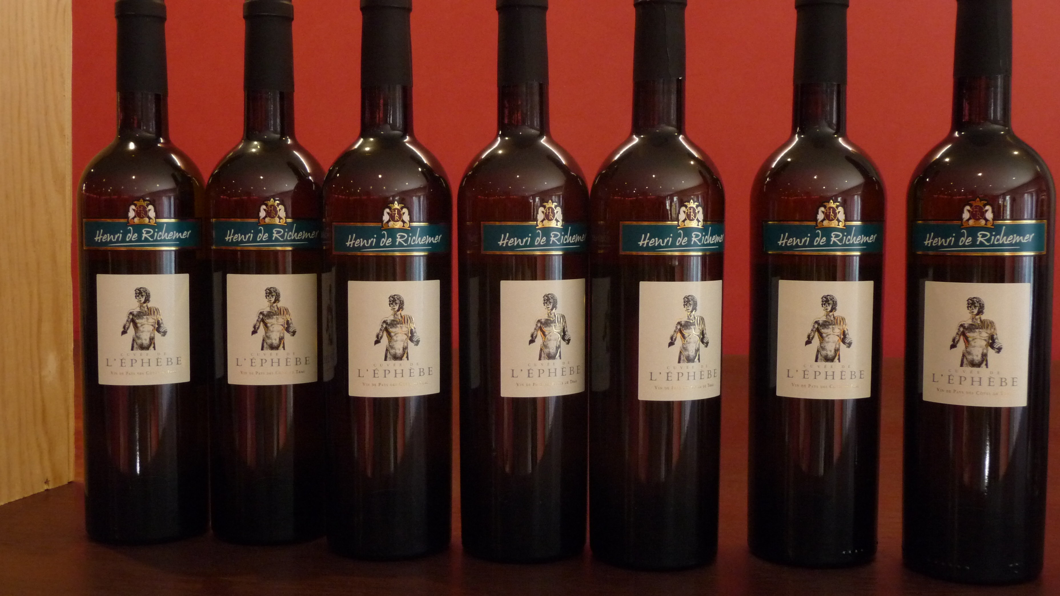 Cuvée de l'Éphèbe (rouge), vin de pays des côtes-de-thau, produit des caves Henri de Richemer à Agde/Marseillan (Hérault, France)